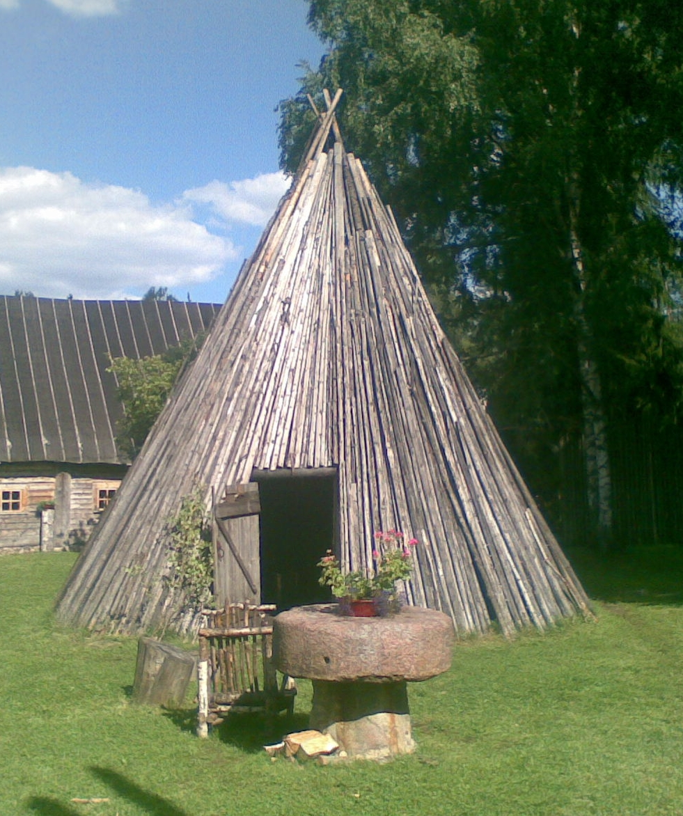 Suveköögina kasutatav püstkoda Mustjõe kõrtsitalus Harjumaal.